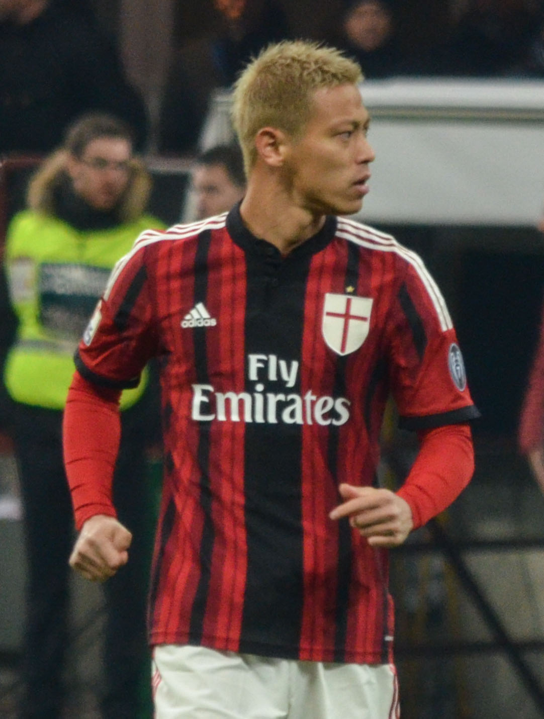 K. Honda durante Milan-Lazio di Coppa Italia 2015